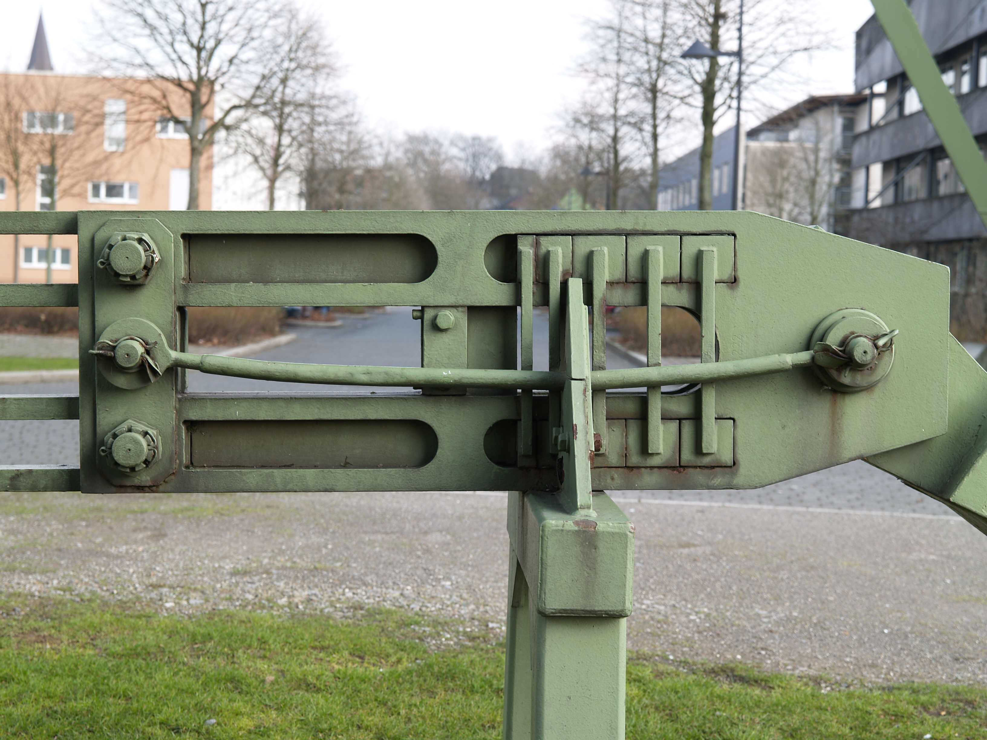 Aufgebocktes Zwischengeschirr, das Element zur Verbindung eines Förderkorbes mit dem Förderseil, Detail Ausgleichsvorrichtung, vor dem Förderschacht der ehemaligen Zeche Erin in Castrop Rauxel. Im Betrieb ist die linke Seite oben.